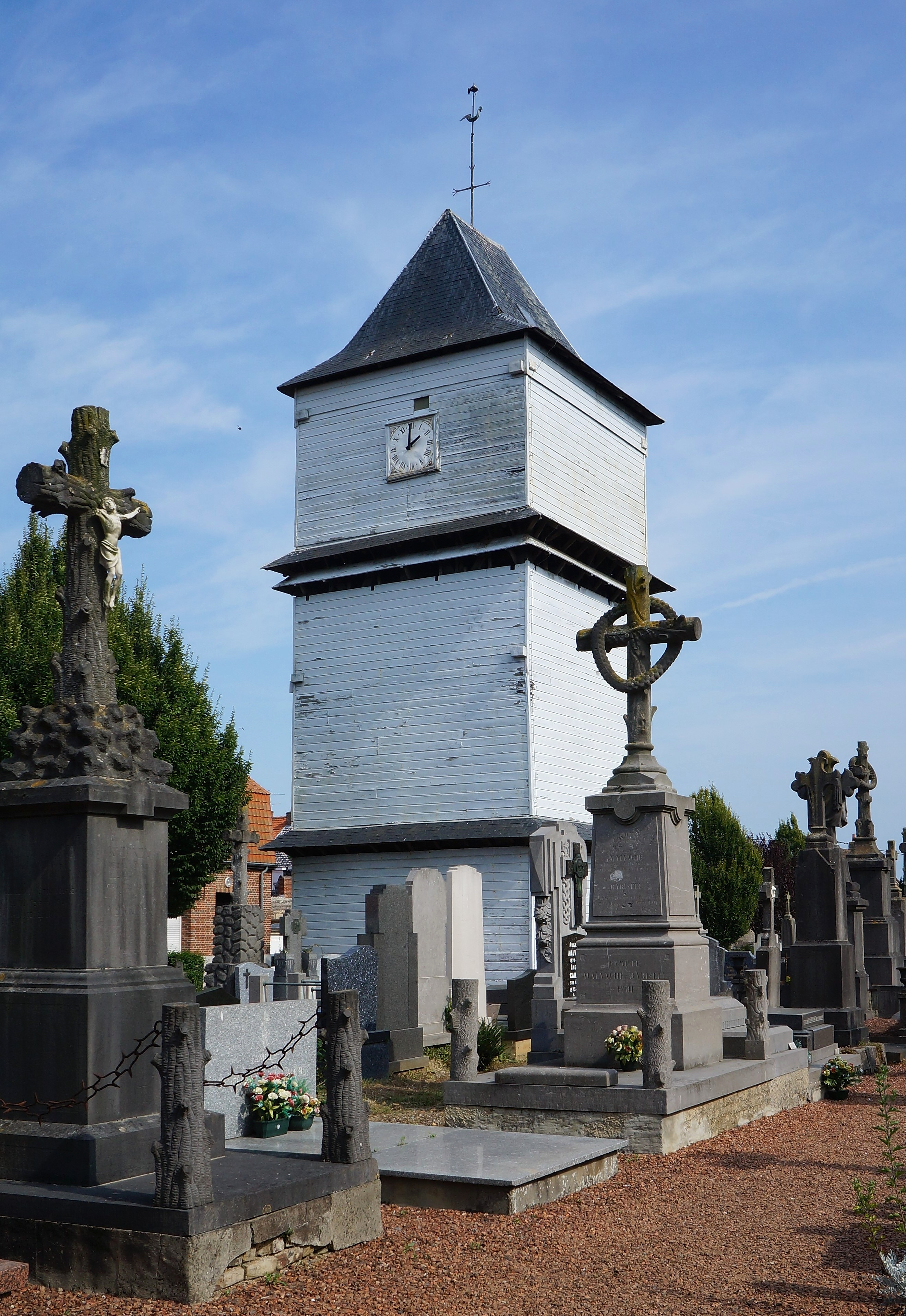 Le klockhuis de l'église Saint-Wulmar Eecke Nord.- France.